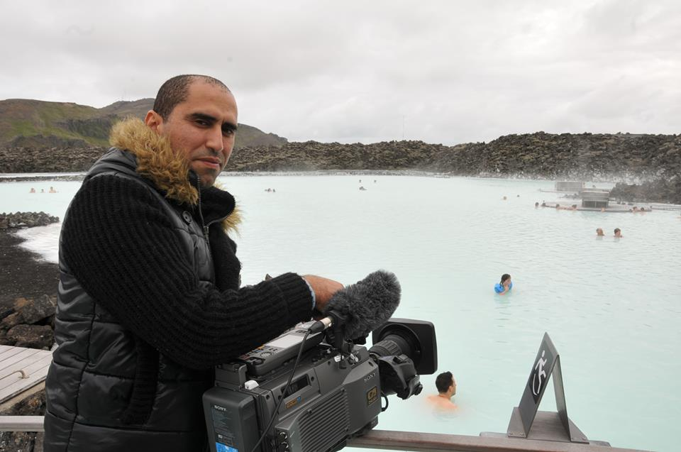 حسن بوفوس باللاغون الأزرق Blue lagon بإيسلندا 2010